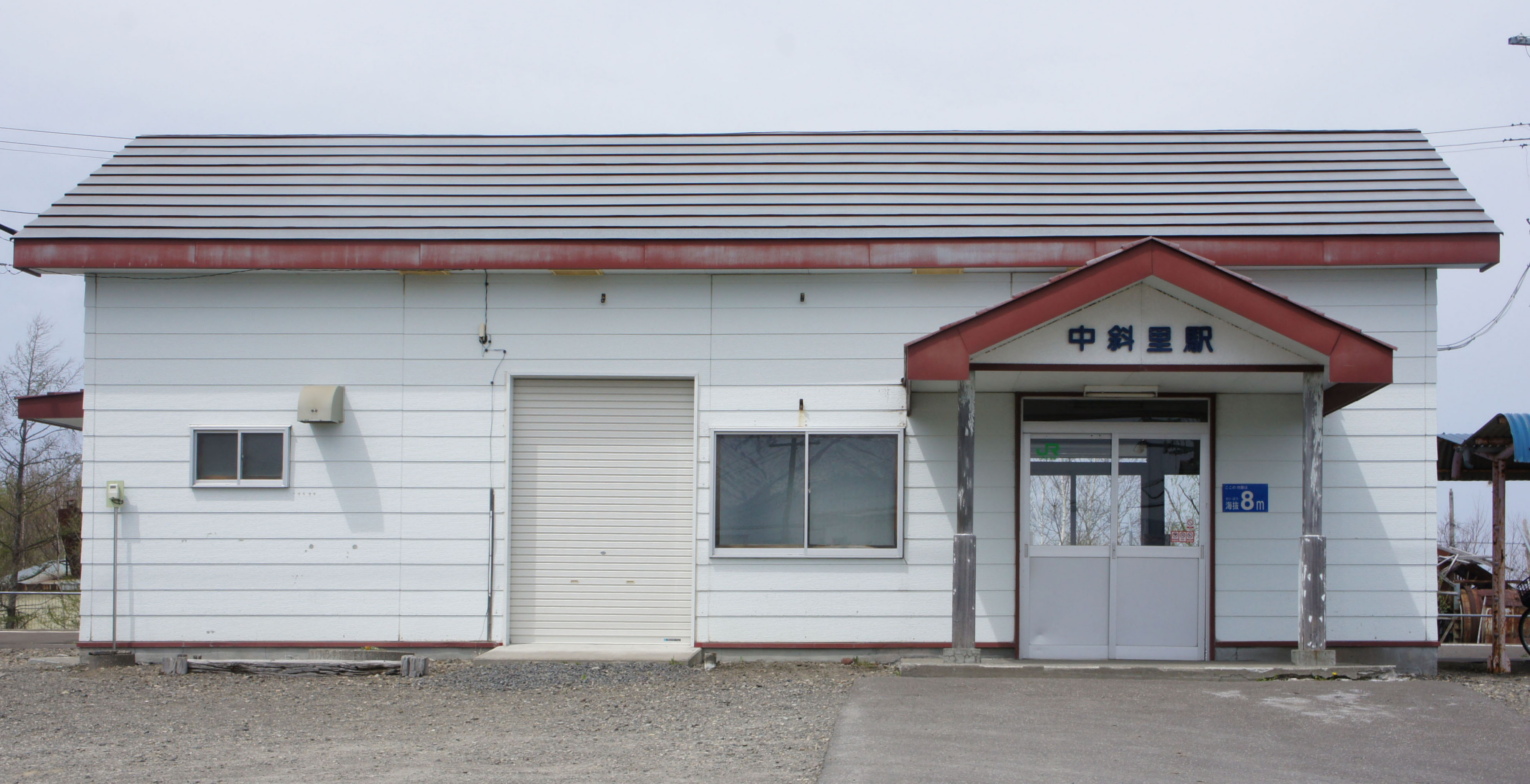 JR釧網本線・中斜里駅の駅舎 Sony NEX-3